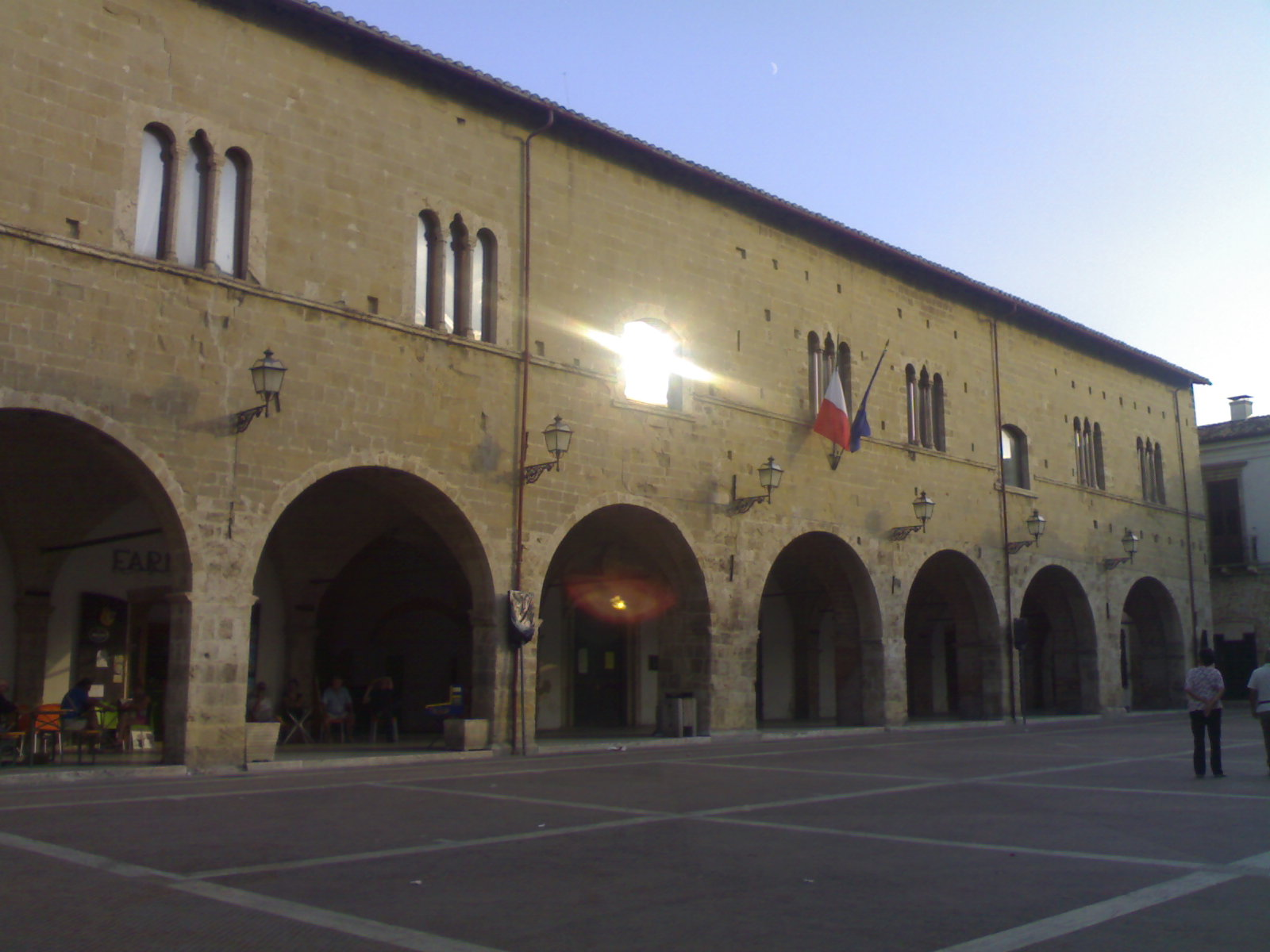 Municipio di Campli (TE), piazza Vittorio Emanuele II